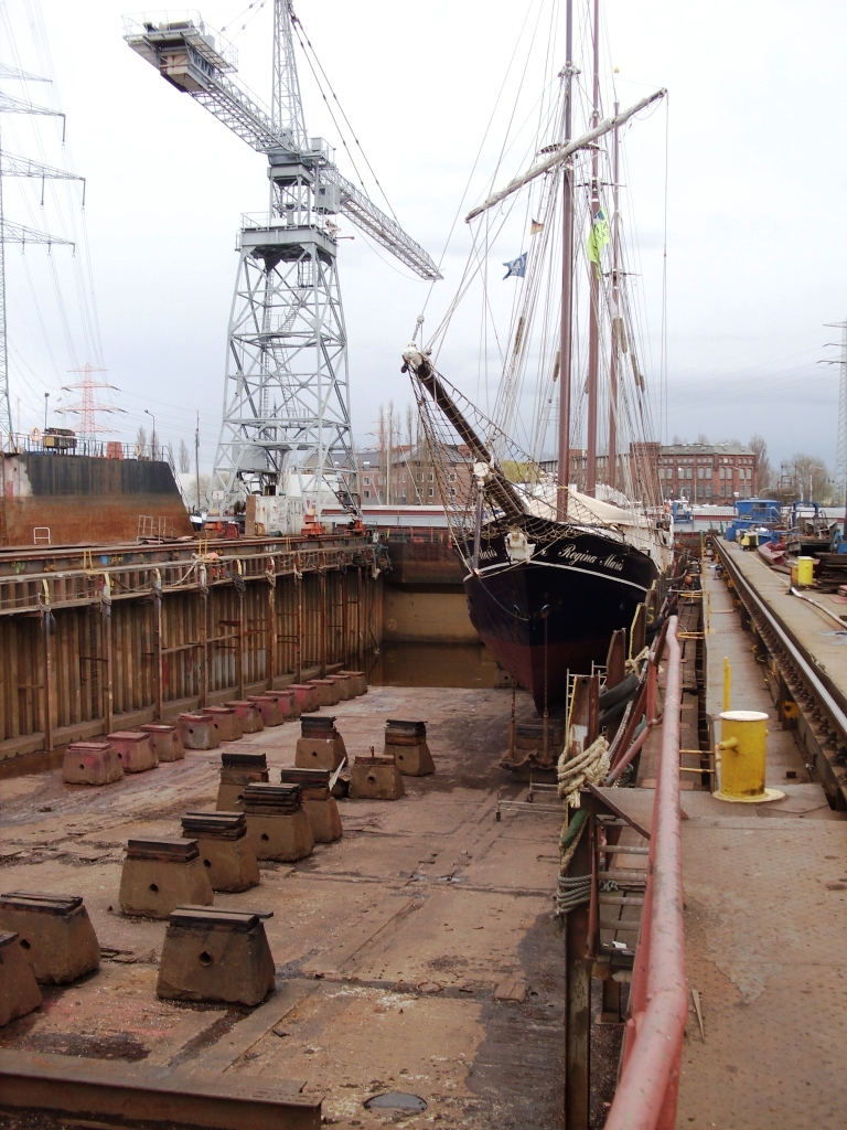 Regina Maris im Trockendock der Jöhnk Werft